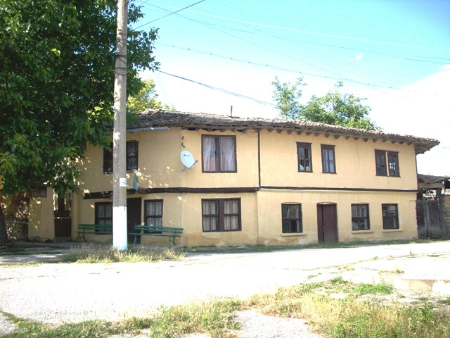 Обновена къща от центалната част на село Иванча, Поповско - юли 2008 год. Фото: Вл. Стойков